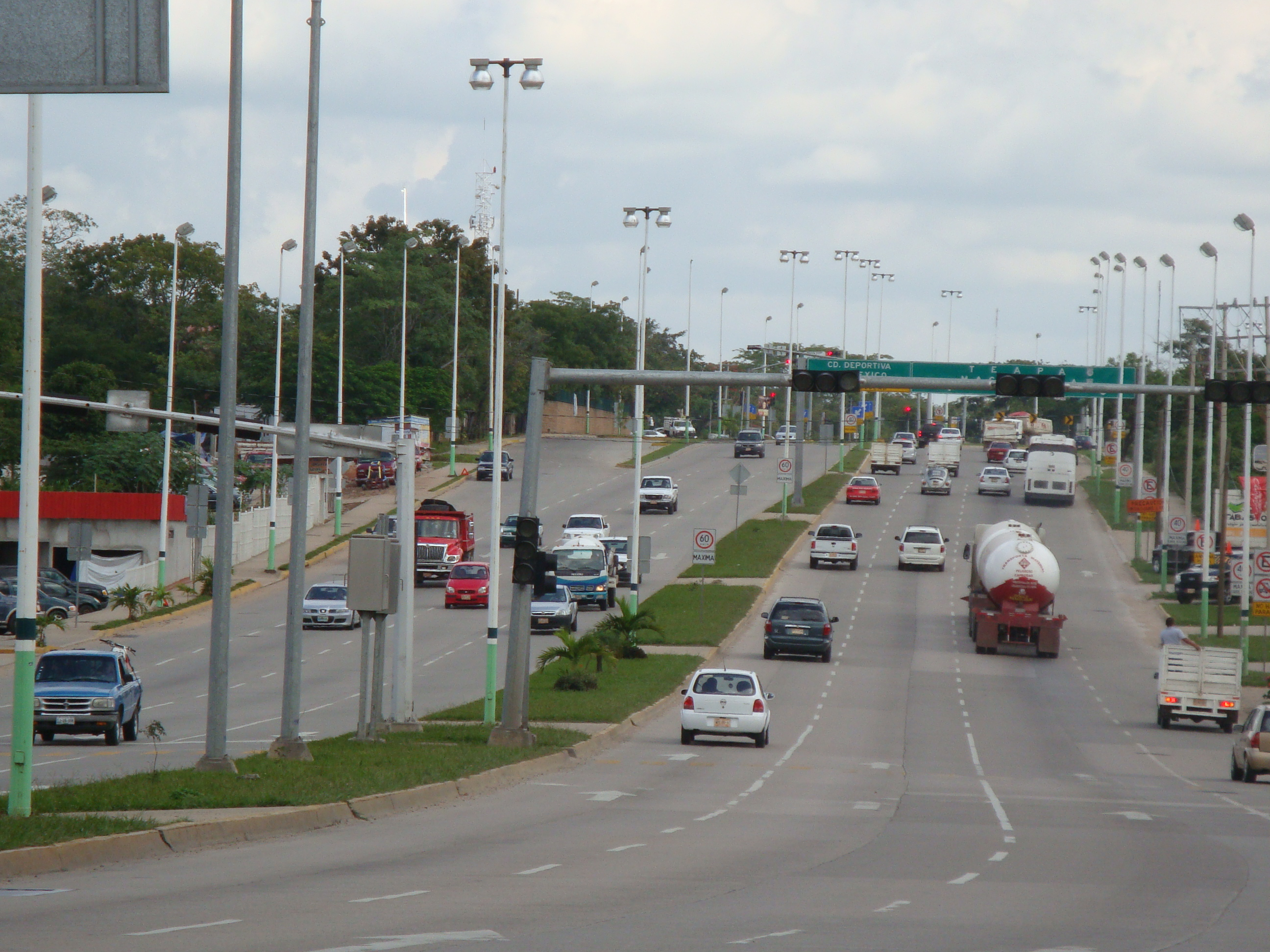 Circuíto Interior, en la ciudad de Villahermsa, estado de Tabasco, México.